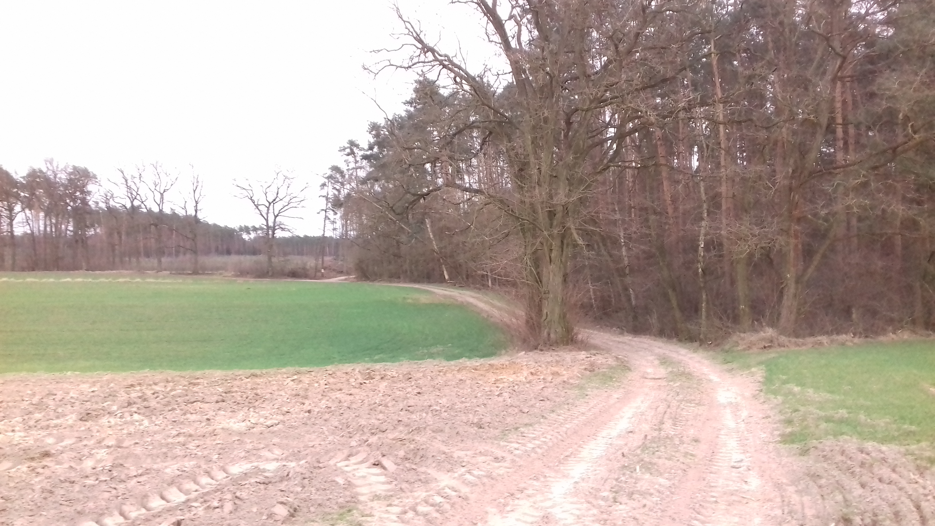 Szlak pieszy czerwony nr 3578 w okolicach Krajkowa